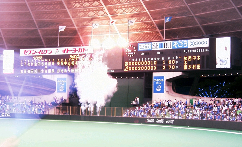 “Seibu Dome” Seibu Lions professional baseball team located in Tokorozawa, Saitama, Japan. “西武ドーム” 日本の埼玉県所沢市にあるドーム式野球場。日本のプロ野球パリーグに加盟する、西武ライオンズのホーム球場でもある。西武ライオンズ対横浜ベイスターズ・セパ交流戦第1試合で西武2,横浜1で西武の勝利。試合後の打ち上げ花火の様子。